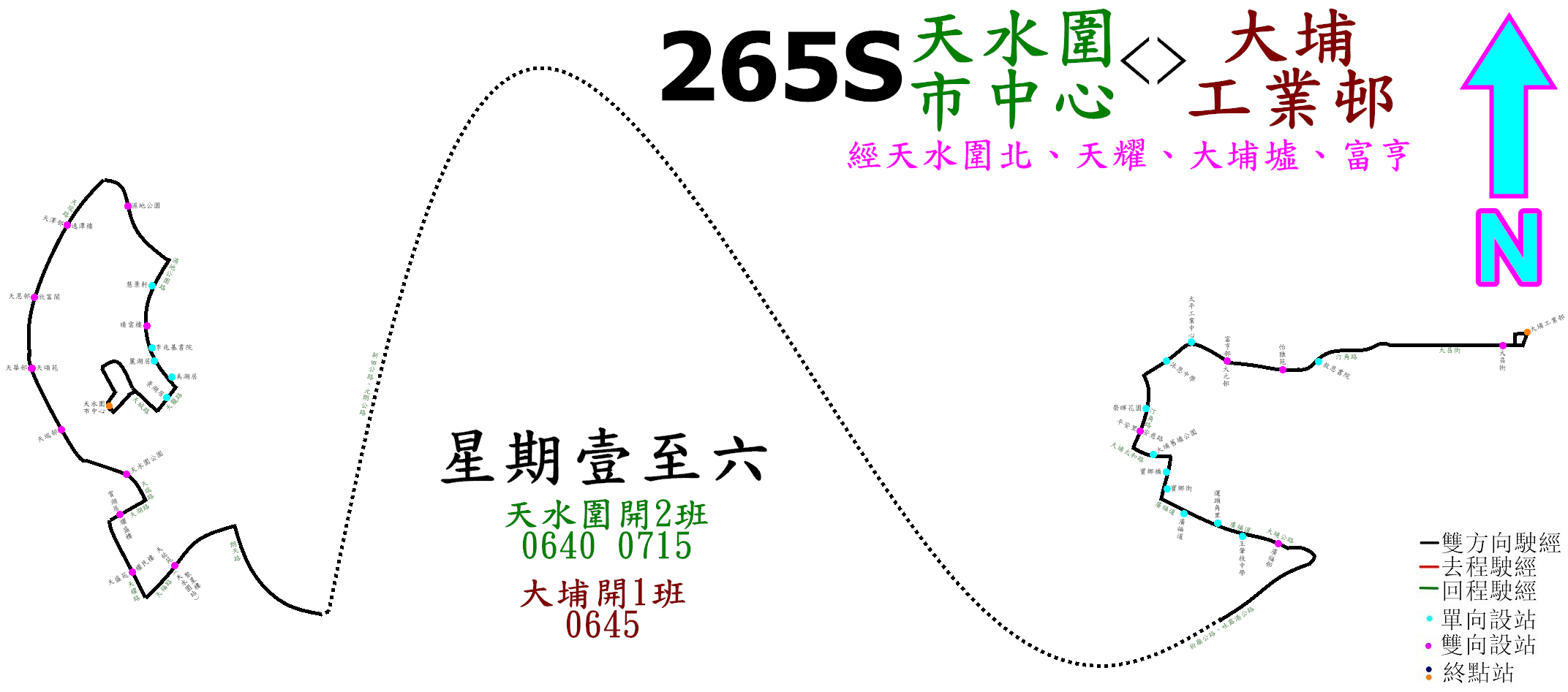 中文（香港）: 九巴265S線的走線圖